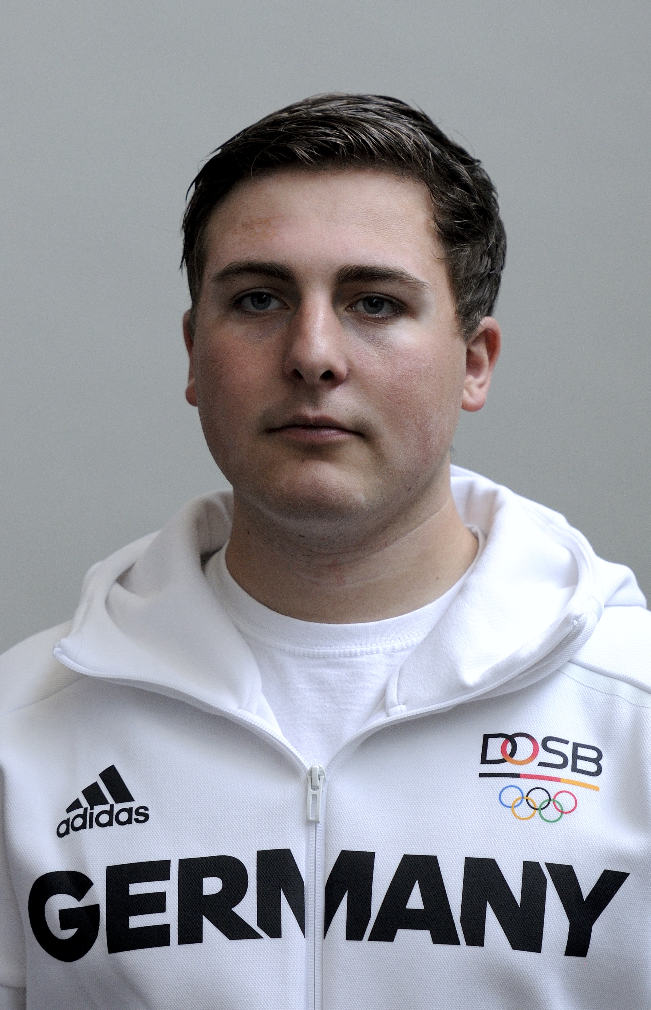 Bild aufgenommen in Hannover während der Einkleidung der deutschen Olympiamannschaft 2016. André Link.